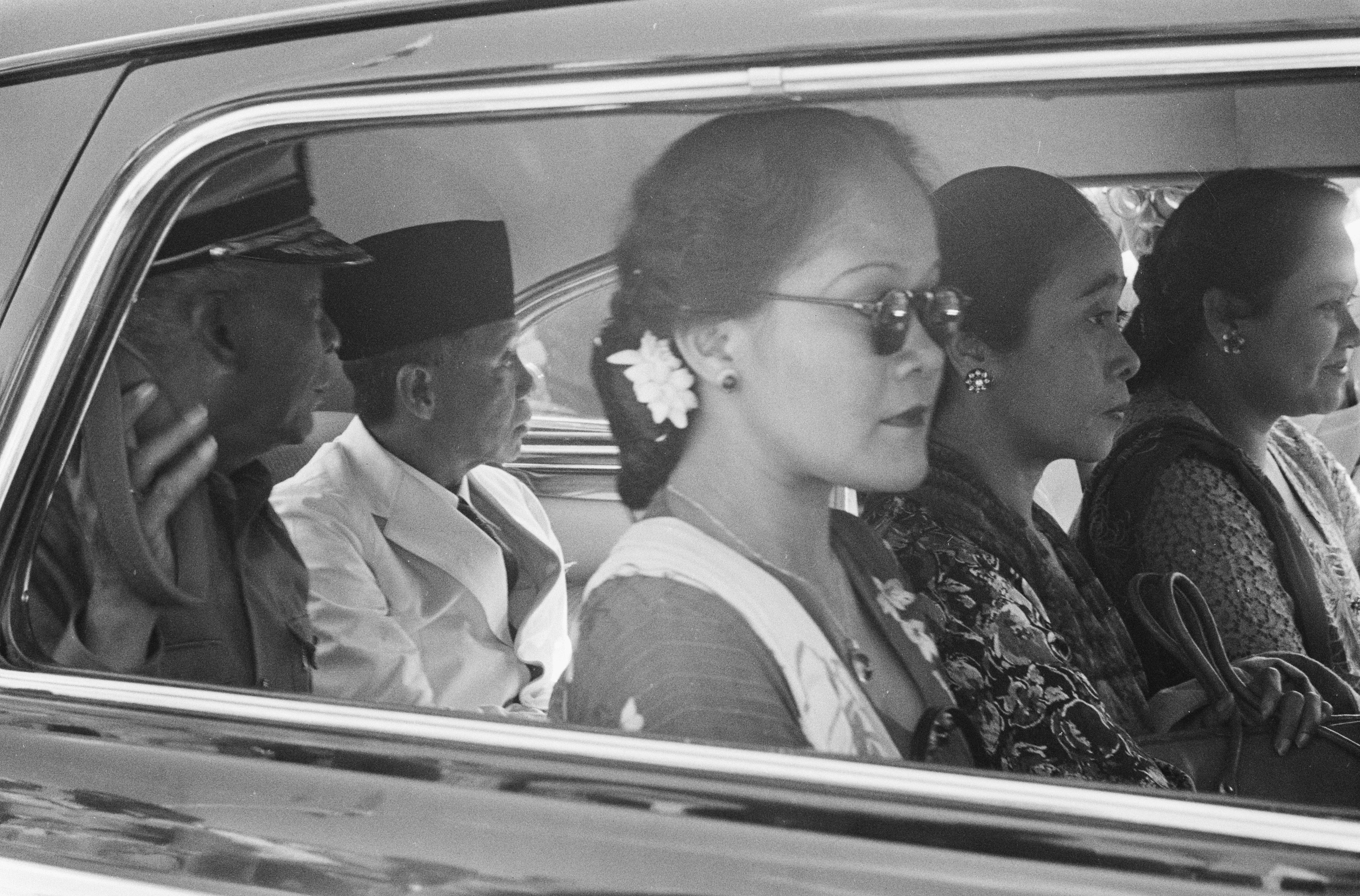 Collectie / Archief : Fotocollectie Dienst voor Legercontacten Indonesië Reportage / Serie : [DLC] Eerste treinrit van Bandoeng naar Garoet Beschrijving : [aankomst van de Recomba voor West-Java R. Hilman Djajadiningrat, en de onlangs herstelde Wali Negara van Pasoendan, Raden A.A. Wirana-Takoesoemah in een auto] Datum : 19 april 1948 Locatie : Garut, Indonesië, Nederlands-Indië Fotograaf : Haasjes, [...] / DLC Auteursrechthebbende : Nationaal Archief Materiaalsoort : Negatief (zwart/wit) Nummer archiefinventaris : bekijk toegang 2.24.04.03 Bestanddeelnummer : 1624-2-1